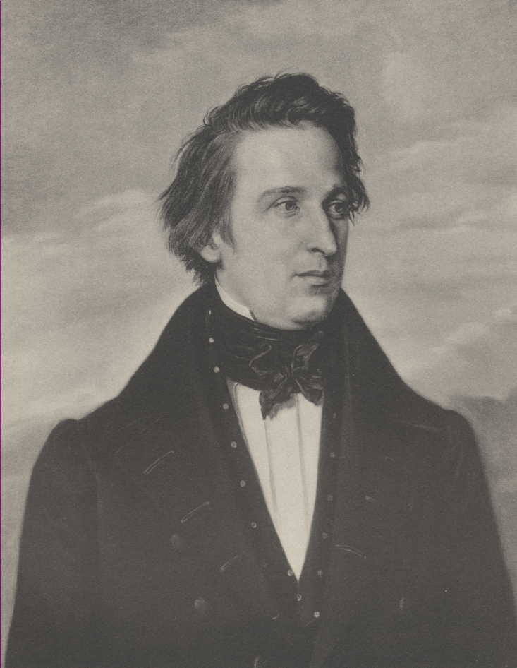 Bild Friedrich Ludwig Hünefeld (1799–1882), ab 1826 Professor für Pharmazie in Greifswald